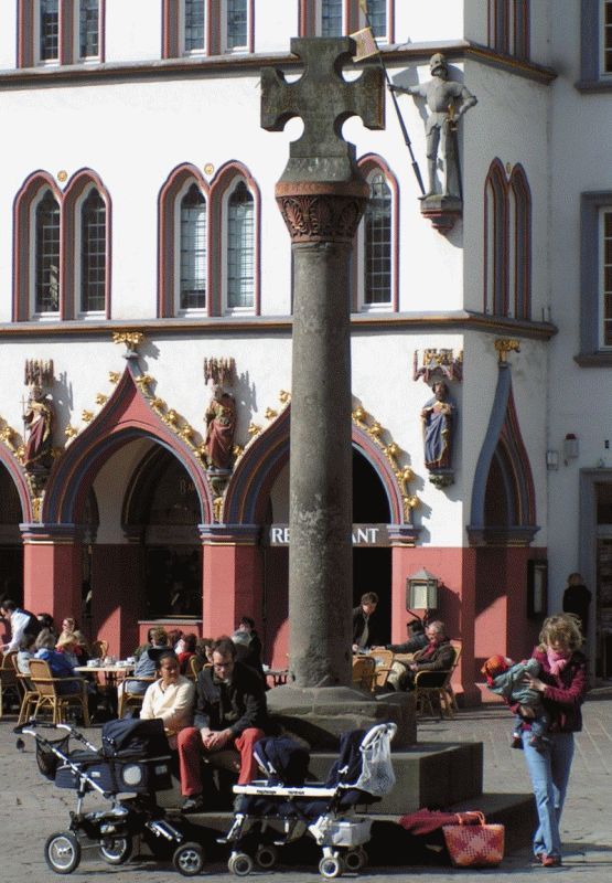 Trier, das Marktkreuz (dahinter die Figuren an der Fassade der Steipe)